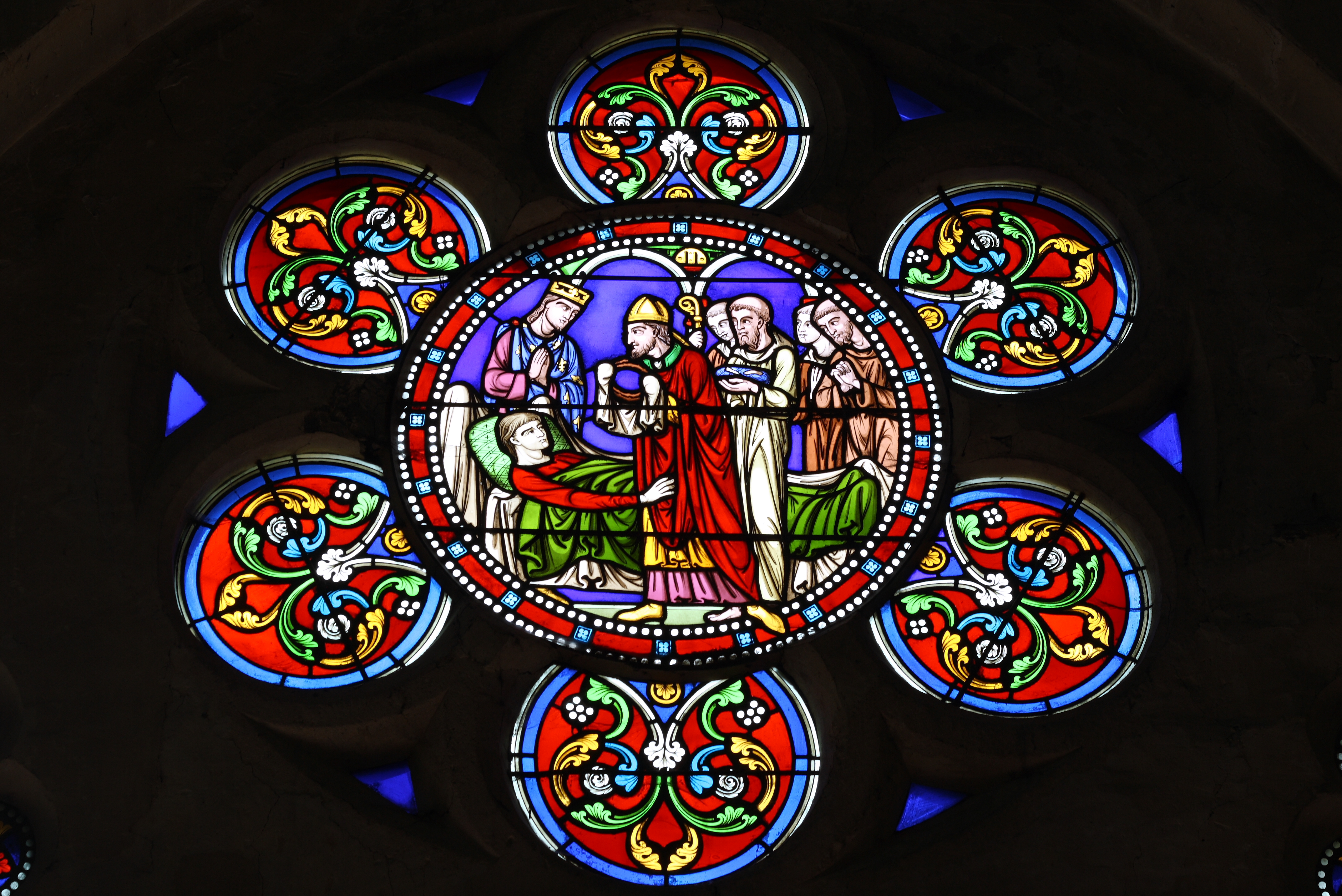 Bleiglasfenster (Rundfenster) in der katholischen Kirche Notre-Dame in Taverny, einer Gemeinde im Département Val-d'Oise (Île-de-France), Darstellung: König Philipp VI. von Valois, sein Sohn im Bett liegend, Mönche der Abtei Saint-Denis mit Reliquien